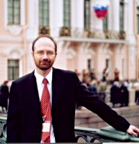 Sergei Kuznetsov (Кузнецов, Сергей Олегович)